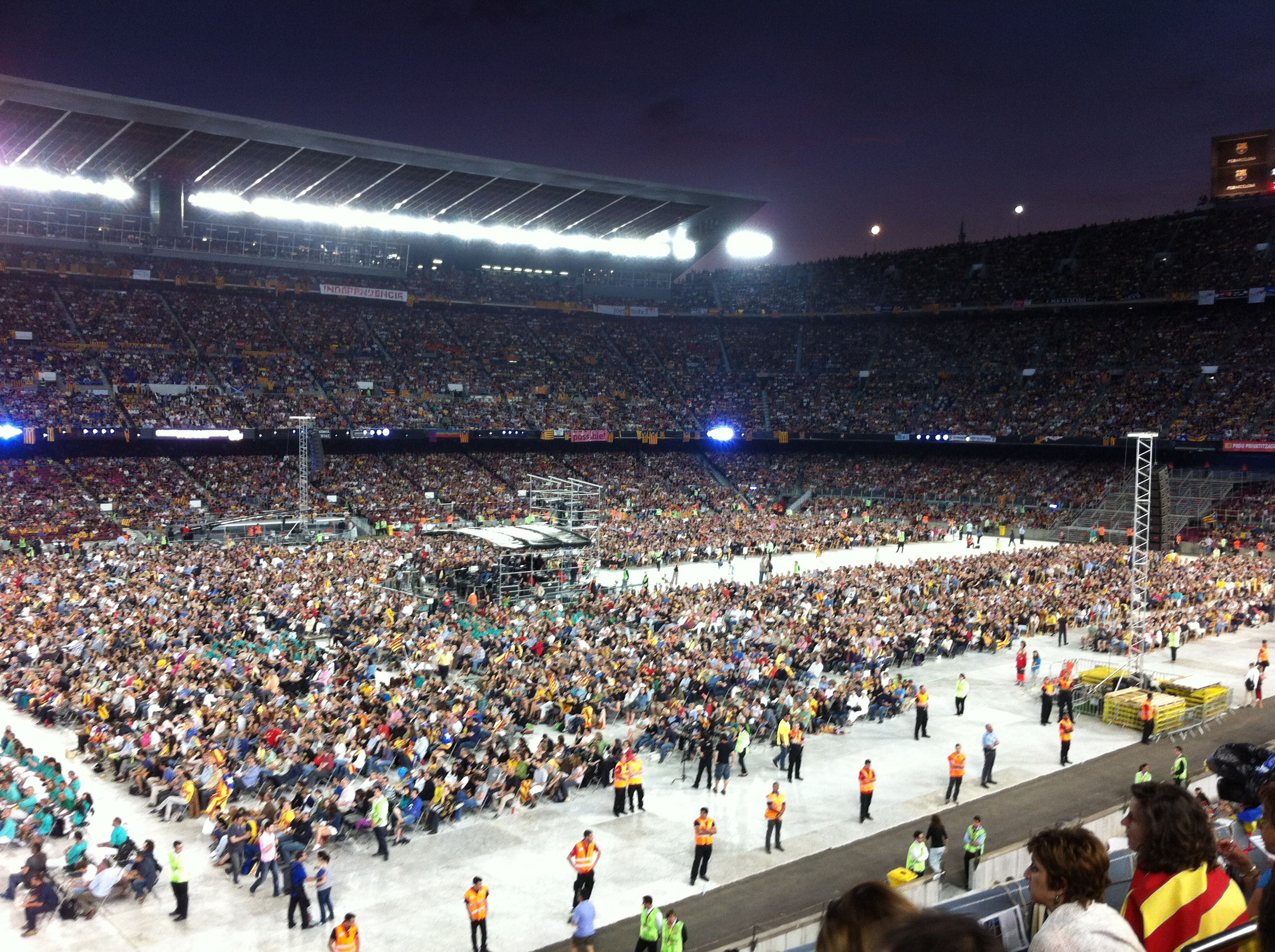 Concert per la Llibertat, Barcelona, 29 de juny de 2013